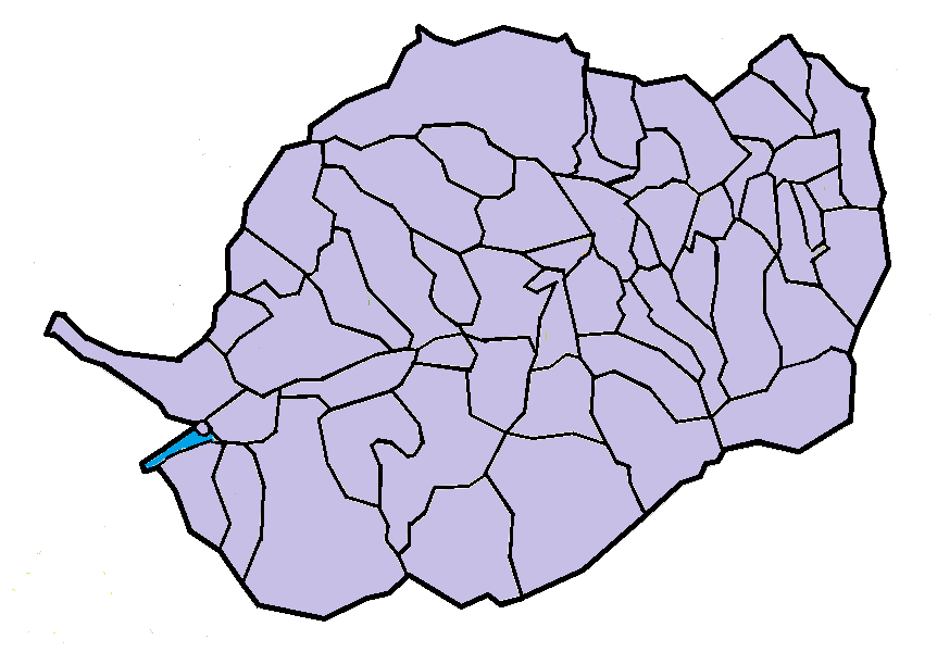 La Cabanassa en el Conflent, a partir del mapa municipal del Conflent de lliure disposició adaptat al Nomenclàtor toponímic aprovat el 2007